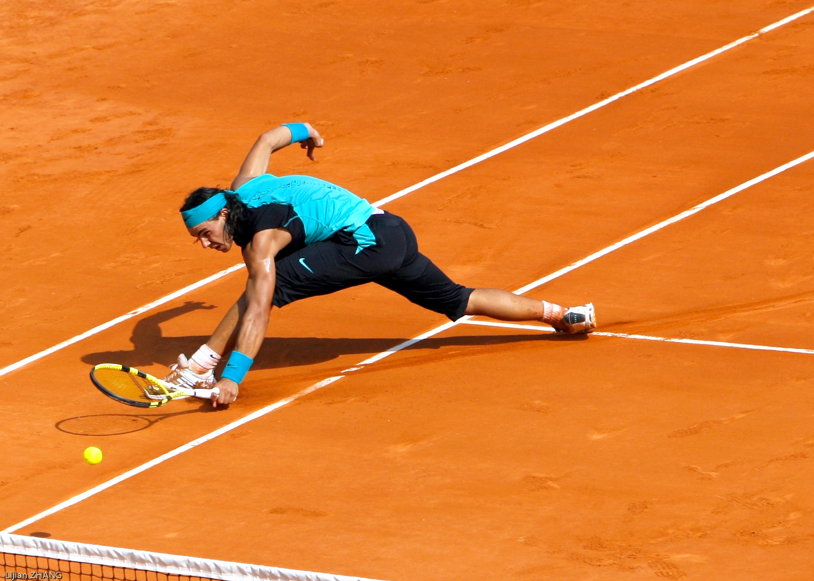 Rafael Nadal, Master Series Monte Carlo 2007